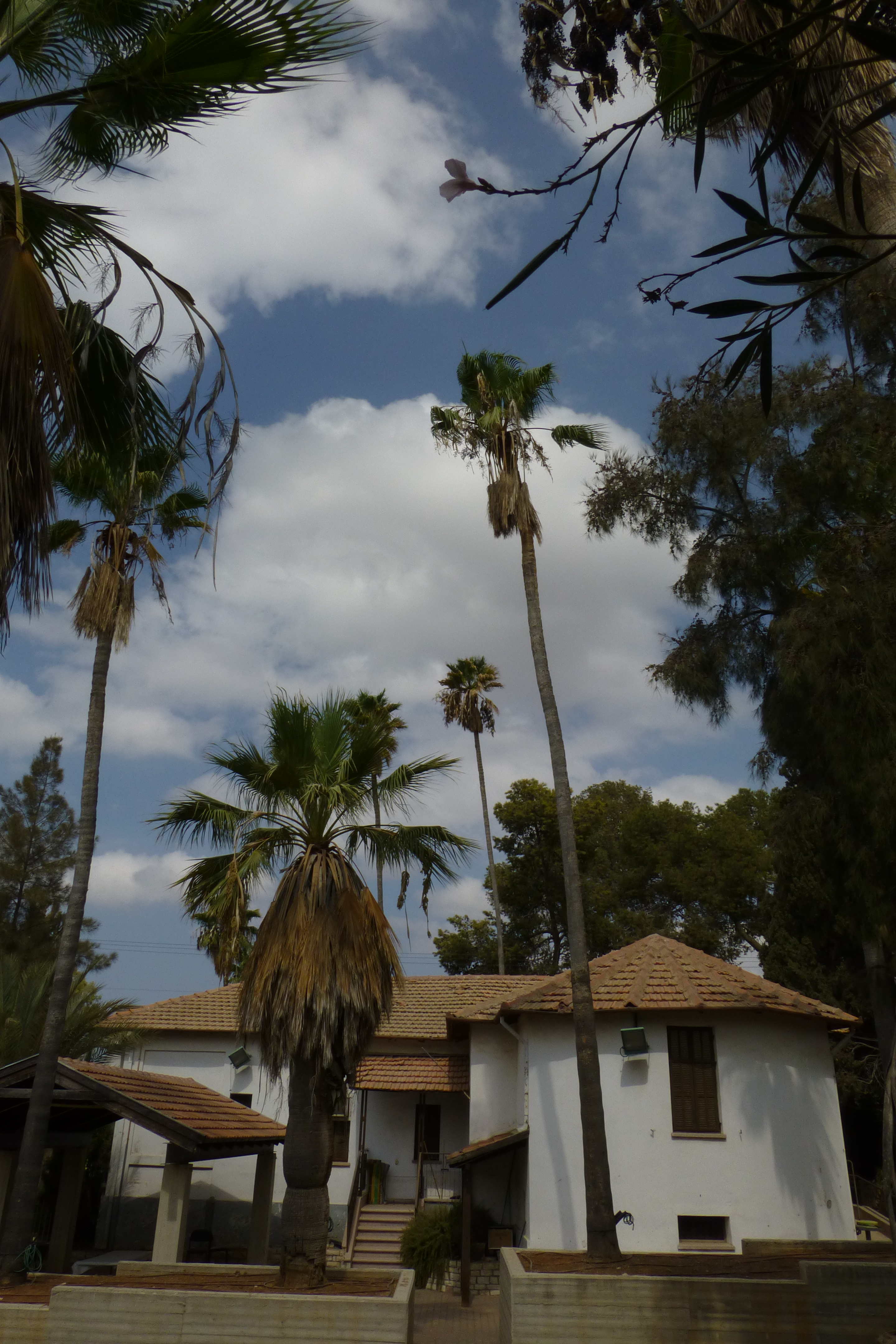 נבנה ב1924, על ידי משה ורחל מינץ. שימש בחלקו המערבי כבית מגורים ובחלקו המזרחי כבית עם. כיום הוא משכנו של מוזיאון לתולדות גדרה והביל"ויים.